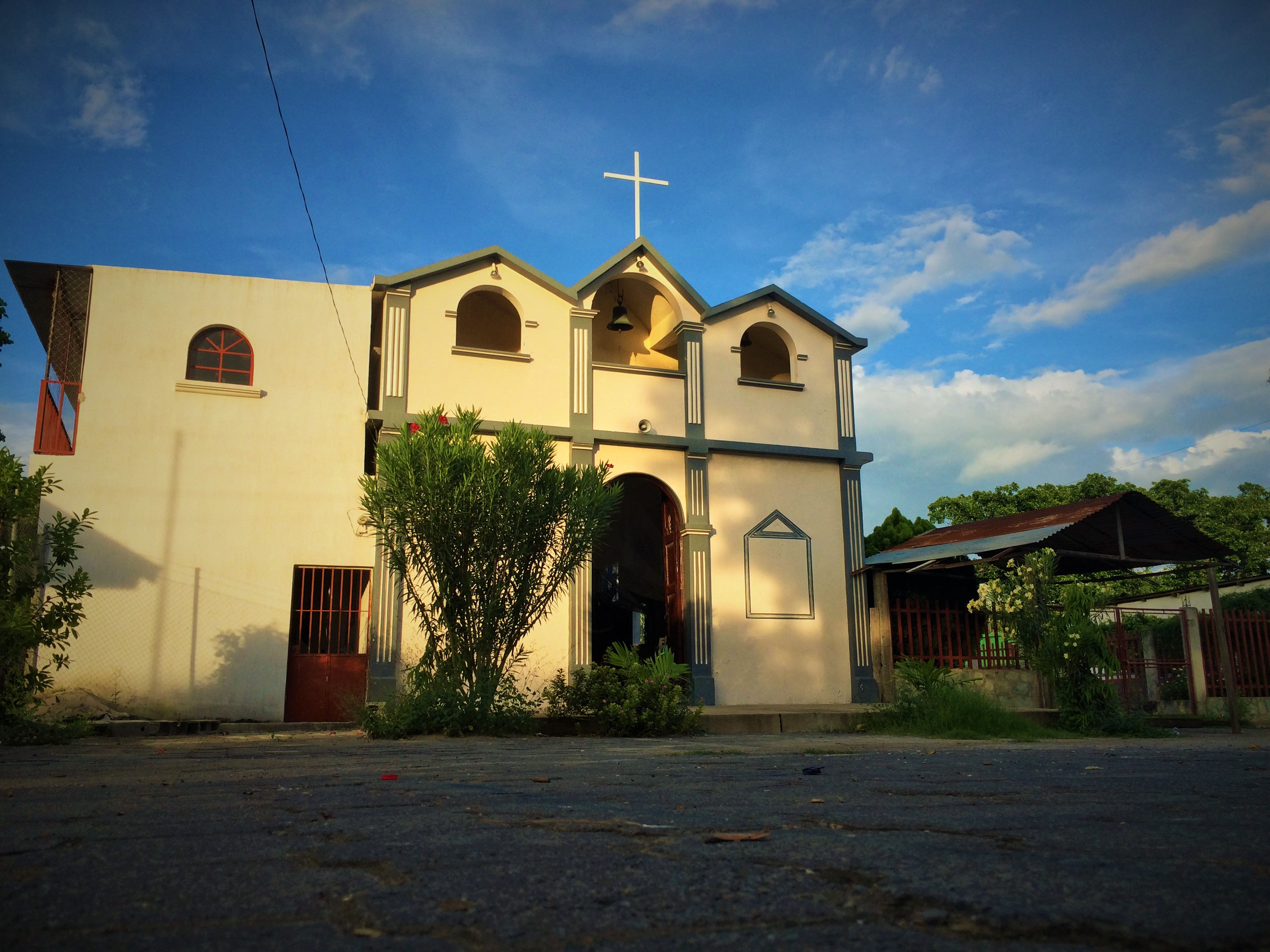 La iglesia de Tulumajillo está ubicada en el centro de la aldea aquí se llevan a cabo actividades de la religión católica